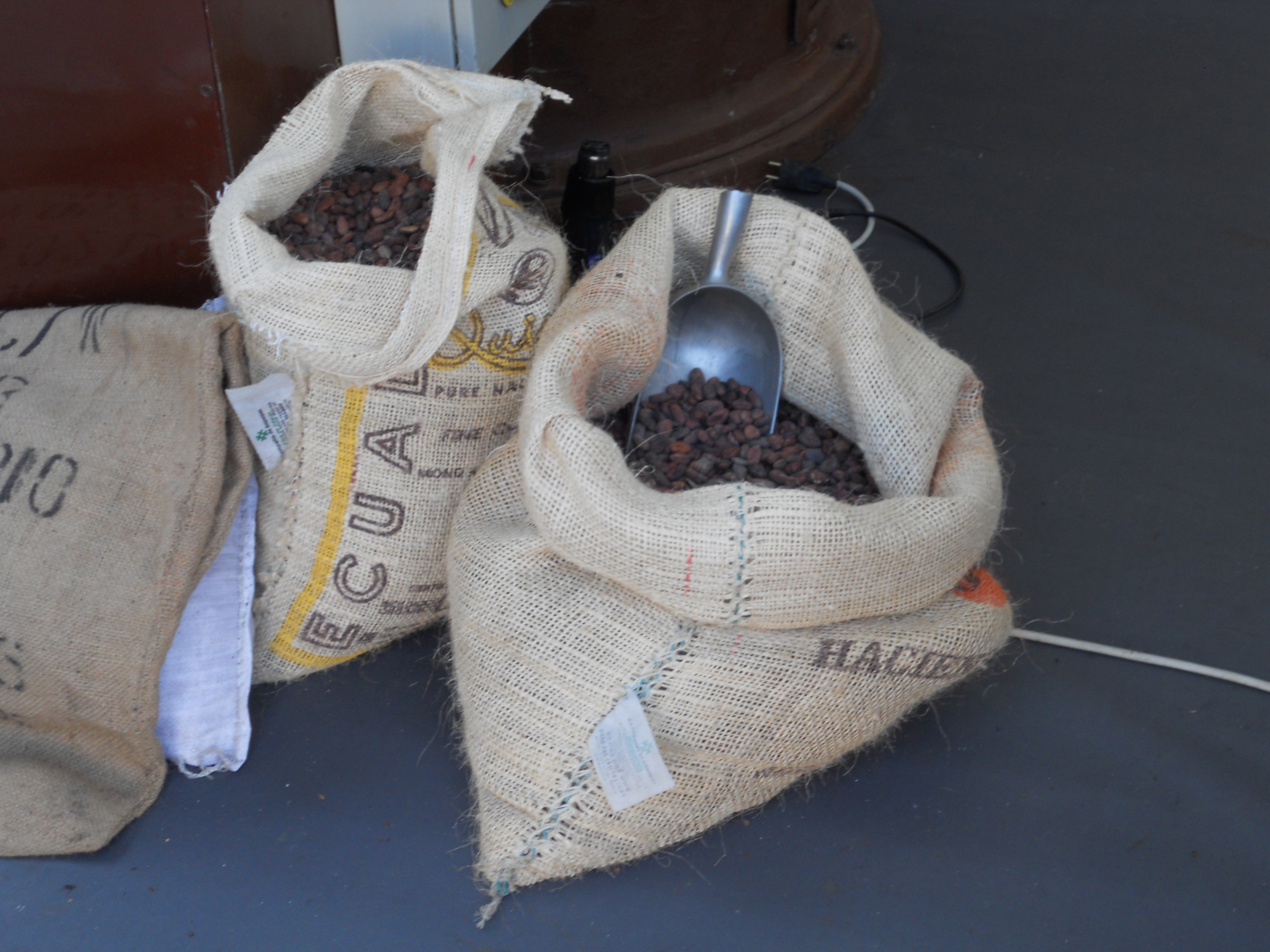 L'evento "CioccolaTò" a Torino nel marzo 2012